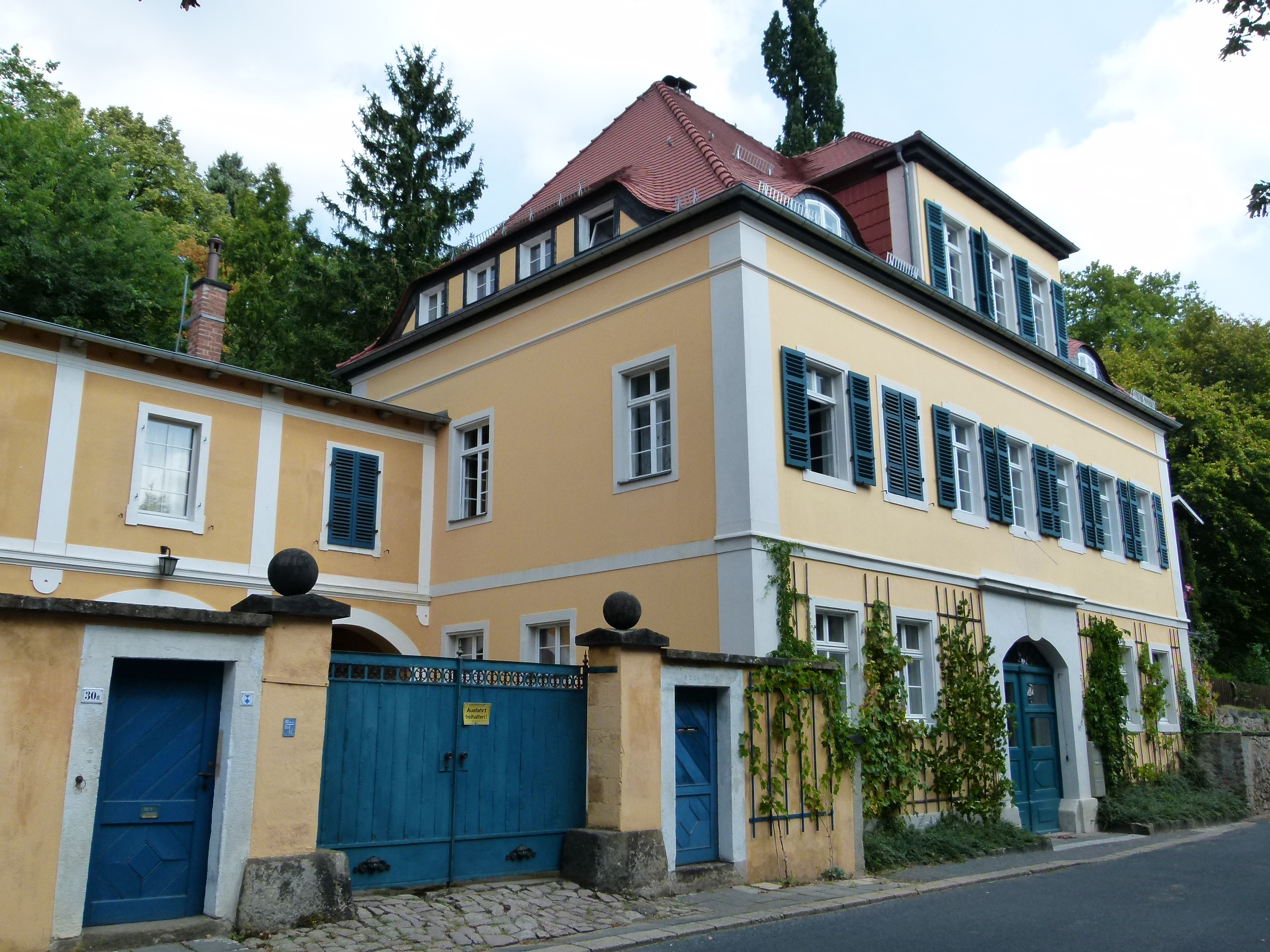 Denkmalgeschütztes Haus, Obere Bergstraße 30 Radebeul, Sachsen